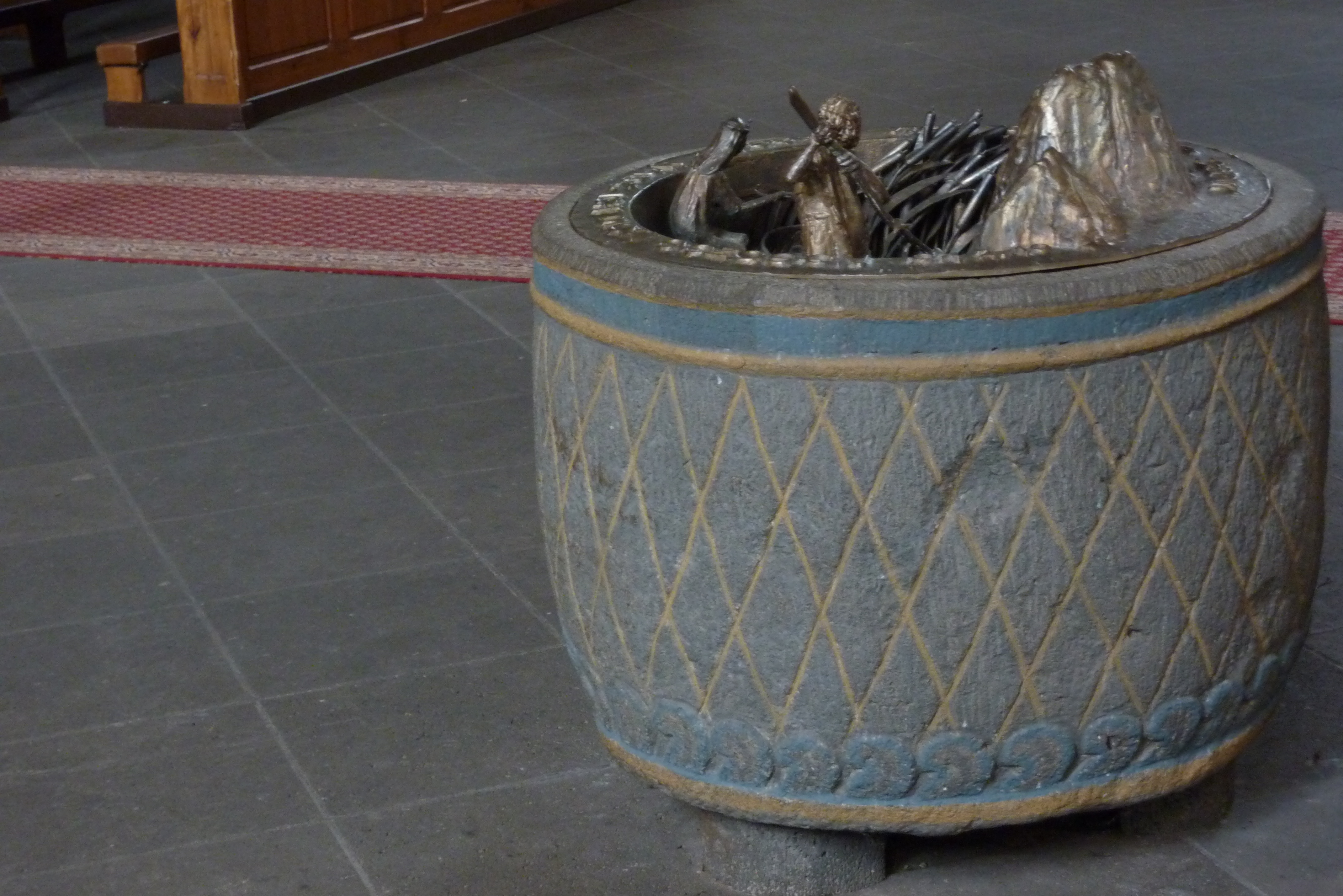 Pfarrkirche St. Philippus und Jakobus in Kempenich; Taufstein mit eingeritztem Rautenmuster, Basaltlava, angeblich 1. Hälfte 13. Jahrhundert